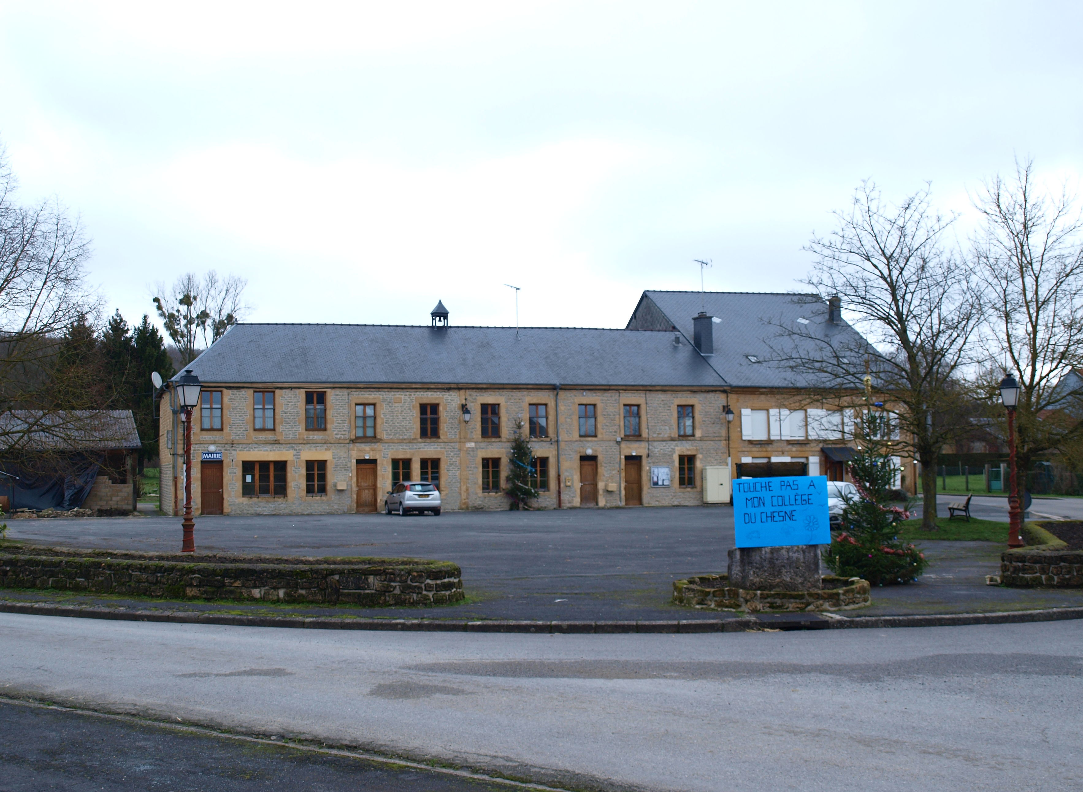 Sauville (Ardennes, France) ; place de la mairie ; avec un panneau de revendication des parents d'élèves en lutte pour s'opposer à la fermeture du collège. A cet endroit se trouvait jadis la "gloye", la mare à usage d'abreuvoir communal.